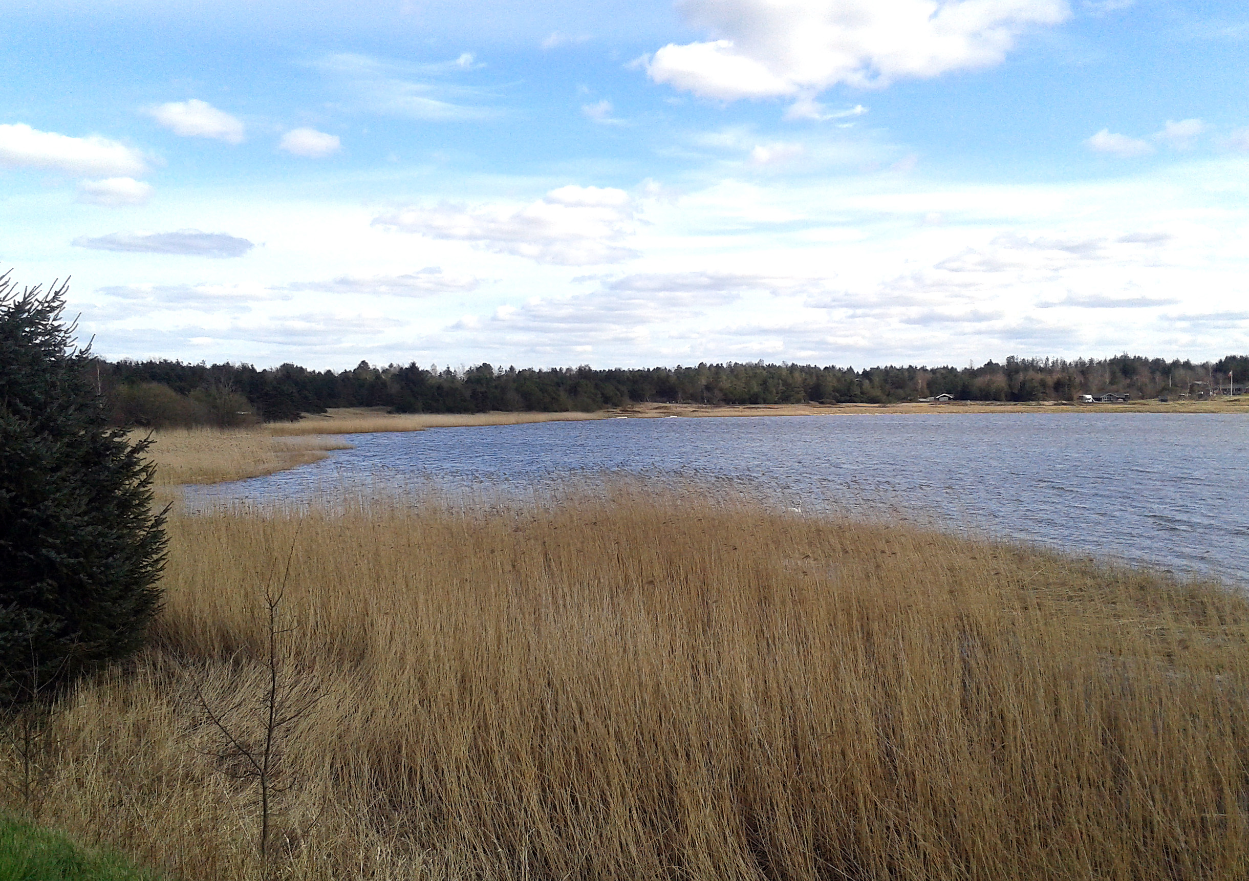 Ørslevkloster Sø ved Hjarbæk Fjord, set mod nordøst